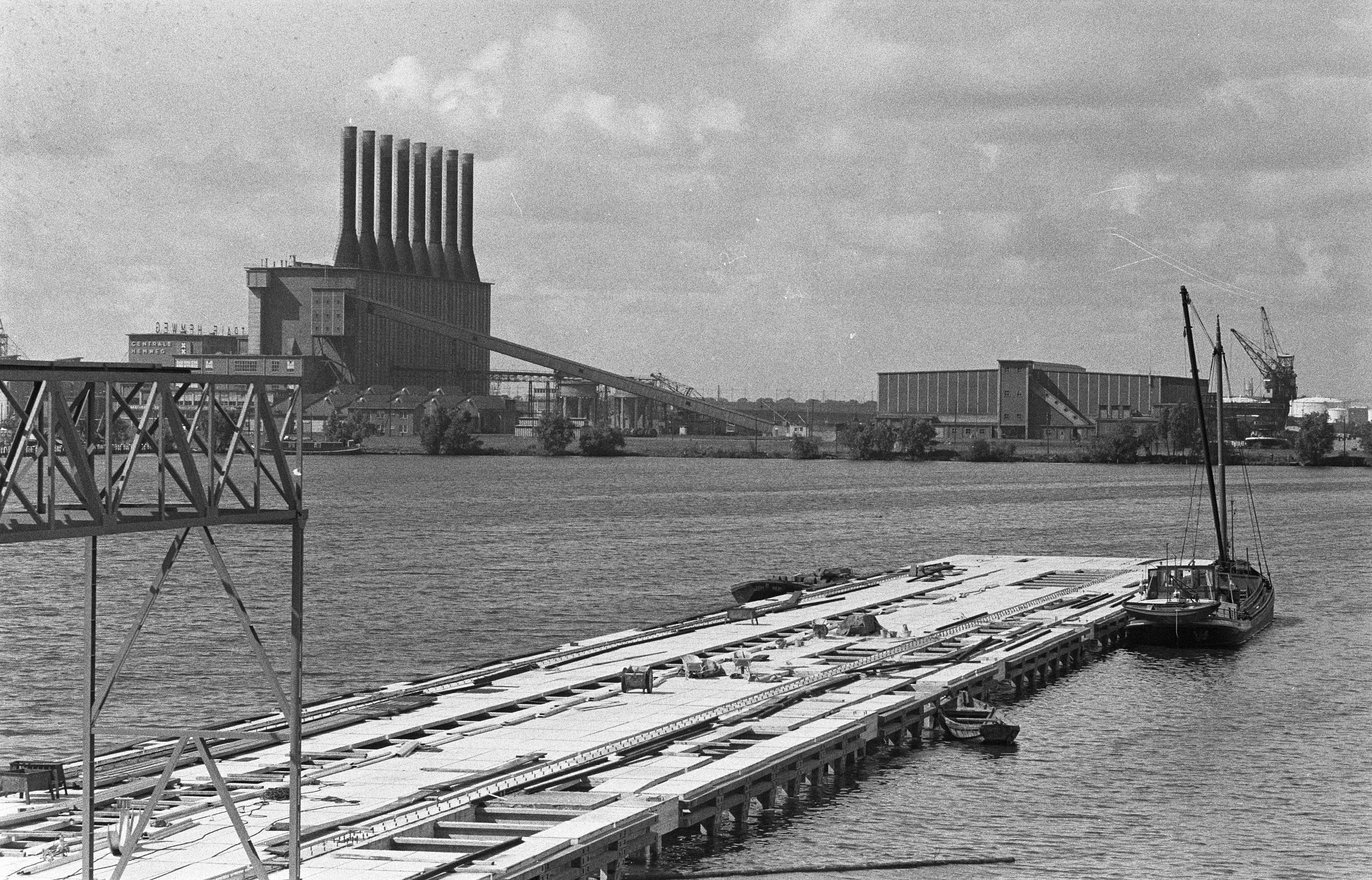 Collectie / Archief : Fotocollectie Anefo Reportage / Serie : [ onbekend ] Beschrijving : De Amsterdamse haven groeit Datum : 6 september 1960 Trefwoorden : HAVENS Fotograaf : Rossem, Wim van / Anefo Auteursrechthebbende : Nationaal Archief Materiaalsoort : Negatief (zwart/wit) Nummer archiefinventaris : bekijk toegang 2.24.01.05 Bestanddeelnummer : 911-5702